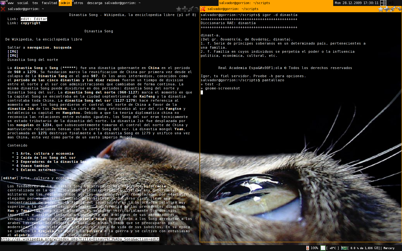 Pantallazo de escritorio con el gestor de ventana "awesome" en marcha.